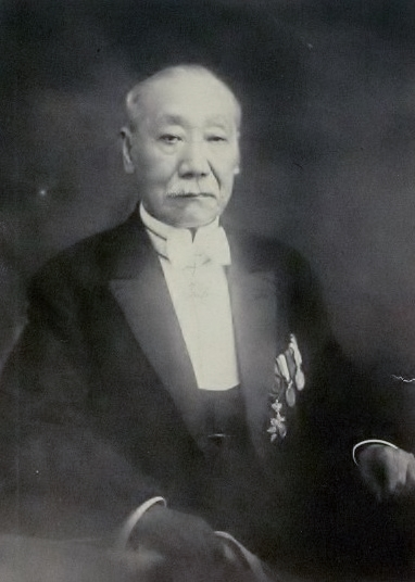 Mitsuaki Hamaoka, 1929